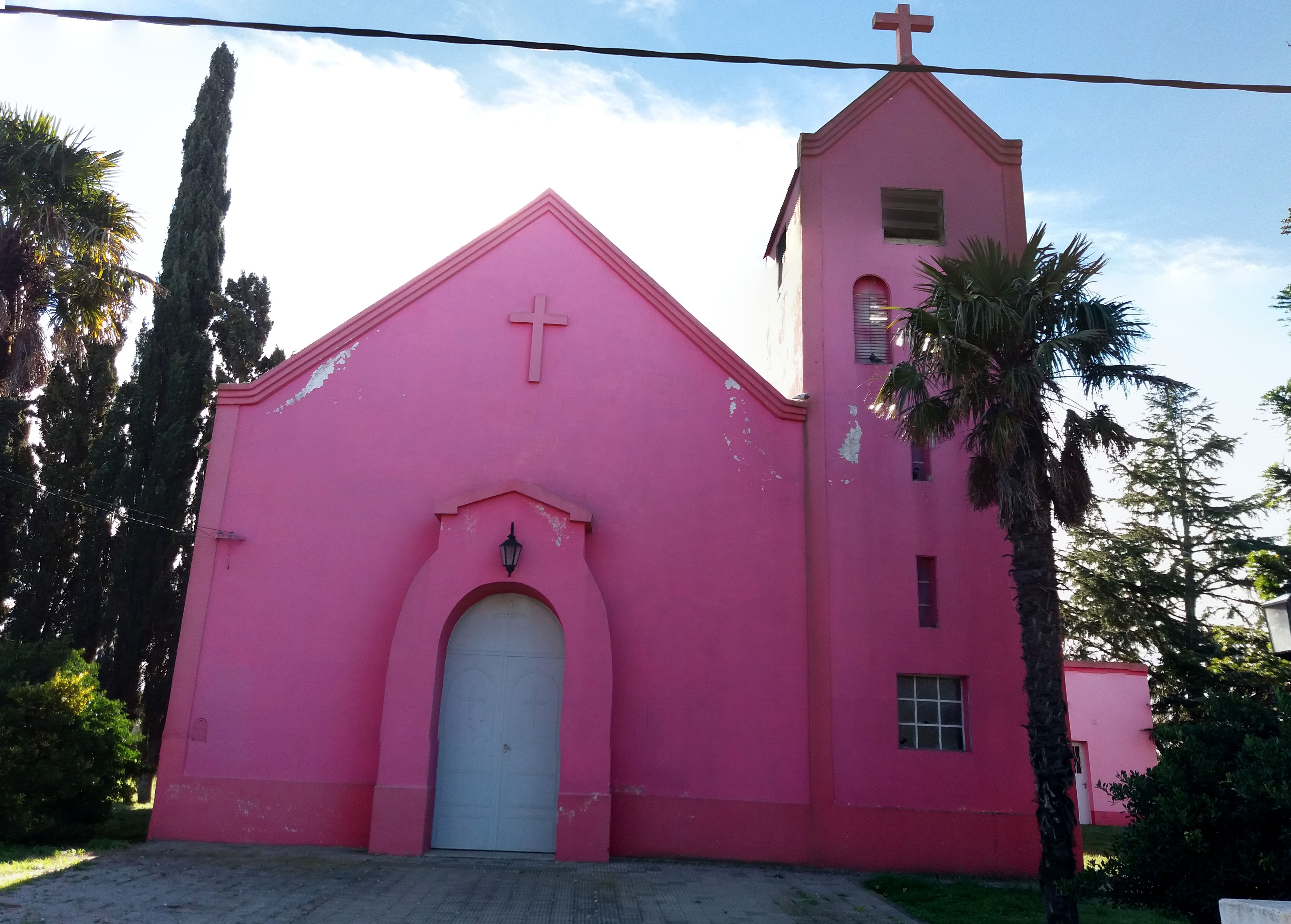 Iglesia Santa Catalina, ubicada frente a la Plaza San Martín (Diecisiete de Agosto, Partido de Puan, Provincia de Buenos Aires)